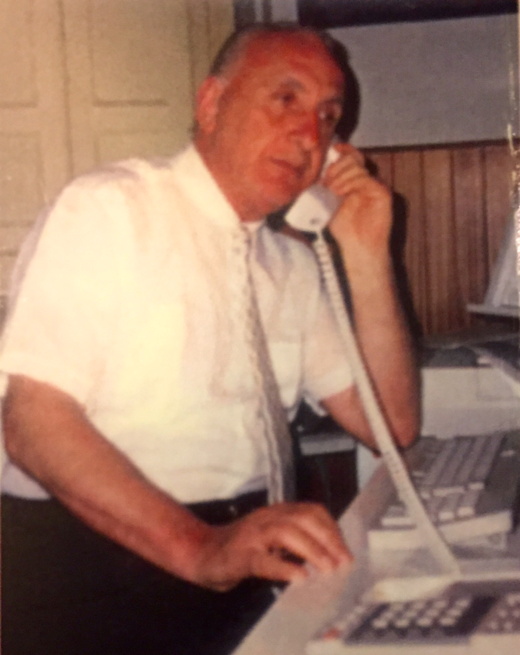 Franco Monaco